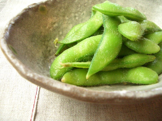 急に食べたくなって...（笑）green soybeans / 枝豆 (Edamame)